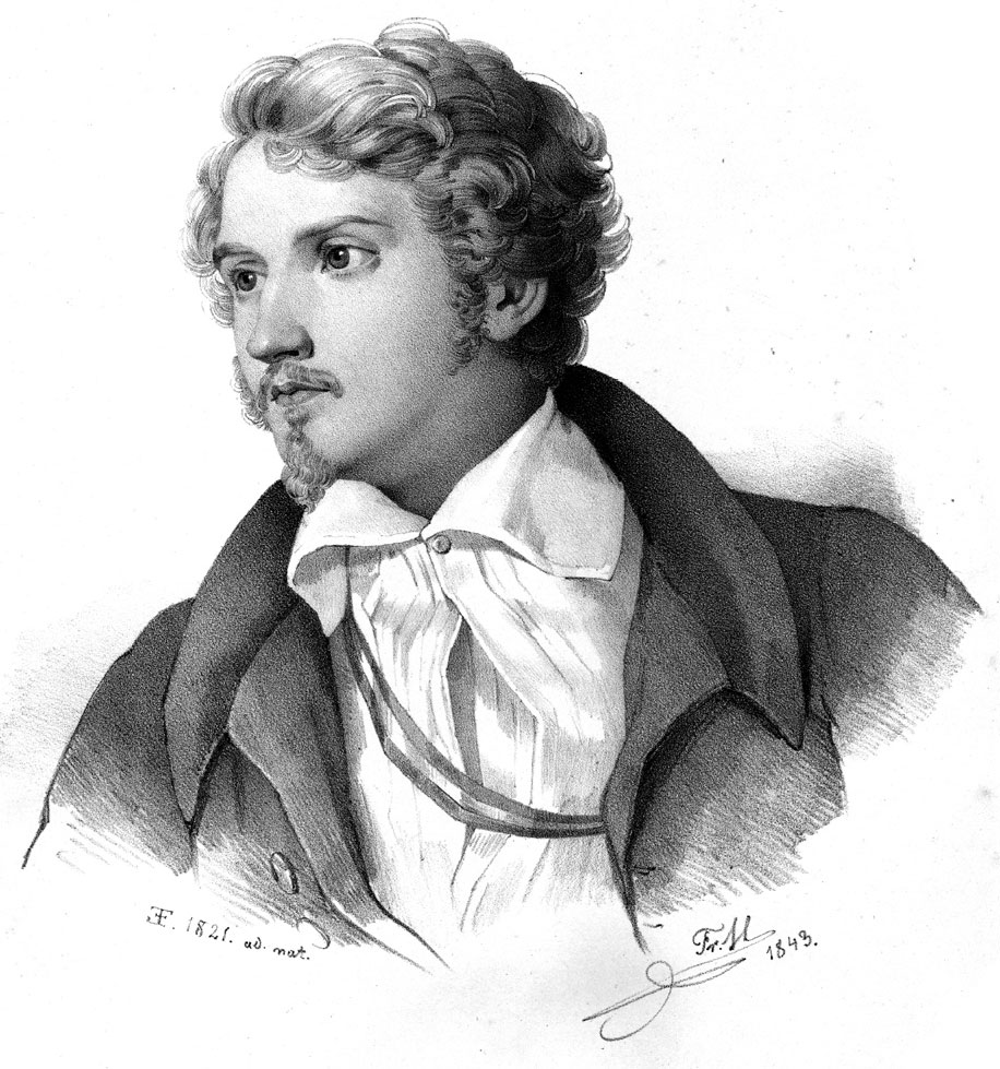 Justus Liebig 1821 als junger Student mit Corpssband des Corps Rhenania Erlangen, Zeichnung von 1843